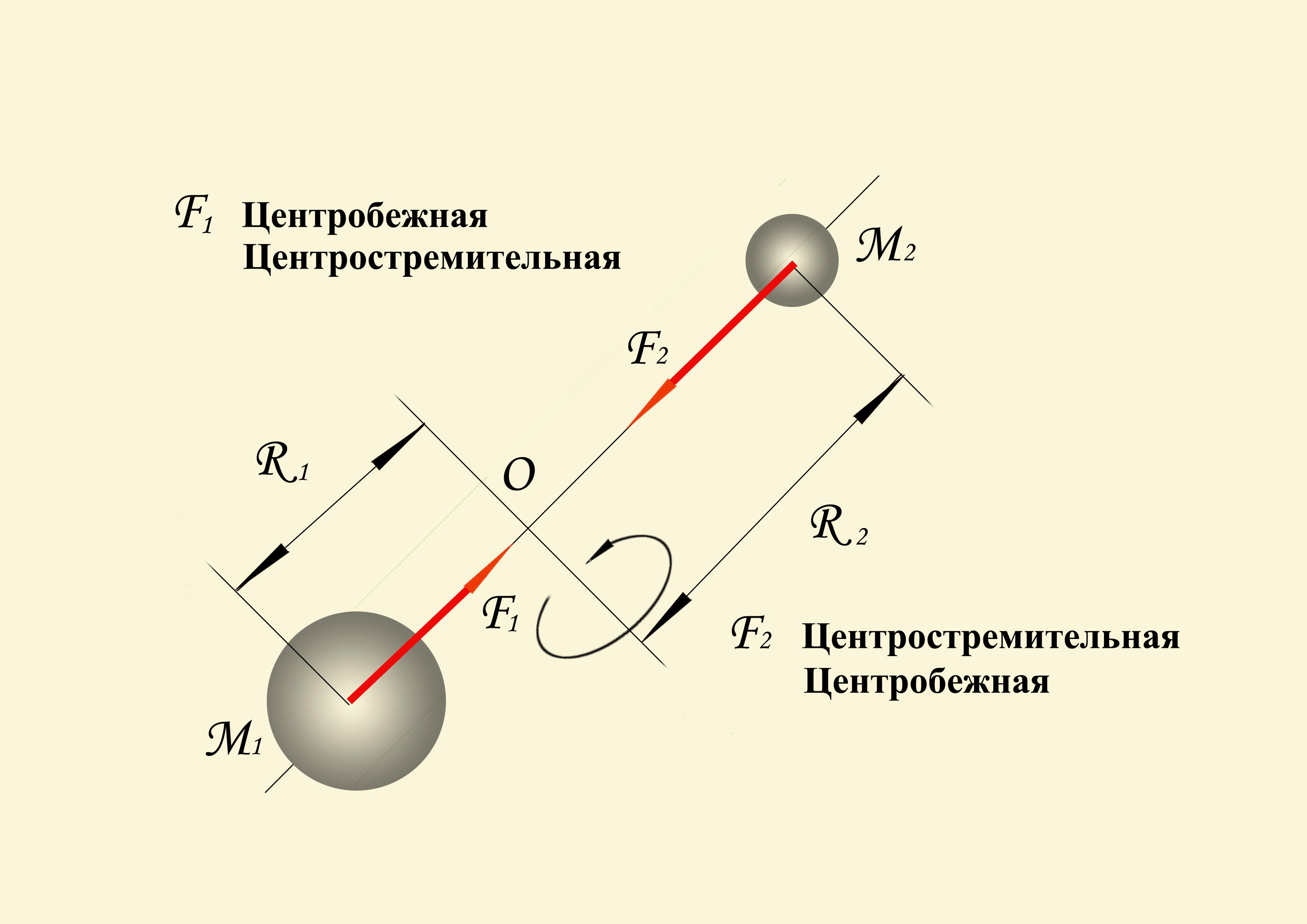 Силы при повороте (вращении)